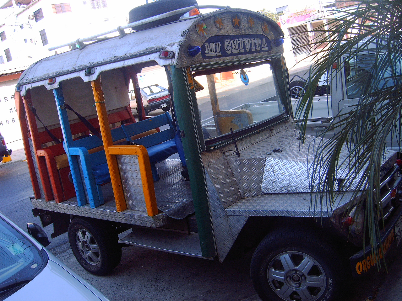 Andino convertido en "mini chiva"